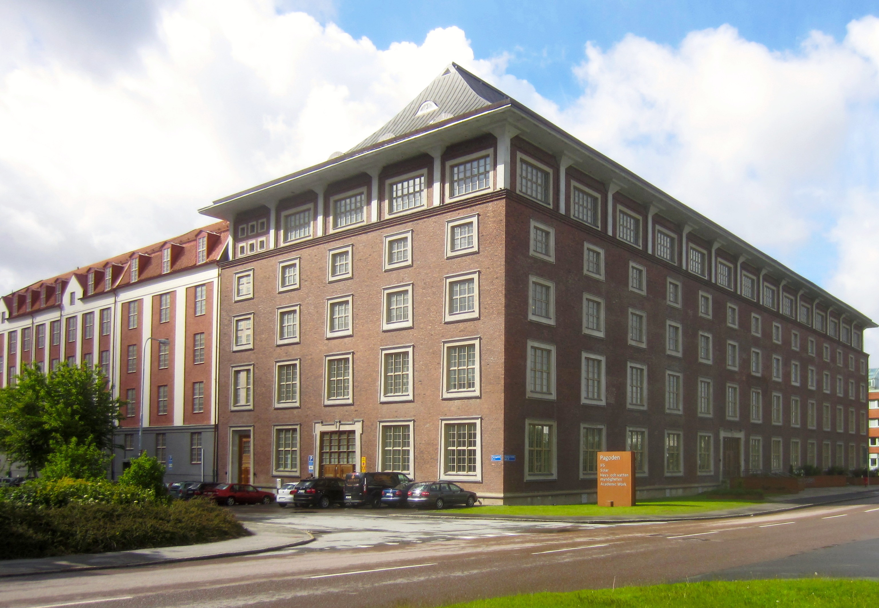 Tobaksmonopolets hus i rött tegel på Hultmans Holme mot Gullbergskajen i Göteborg uppfördes 1928-29. Det ritades av arkitekten Cyrillus Johansson i en kinesiserande stil med utsvängt koppartak. Byggnaden, som kallas Pagoden efter sitt pagodtak, huserade ursprungligen snuslager och kontorslokaler.